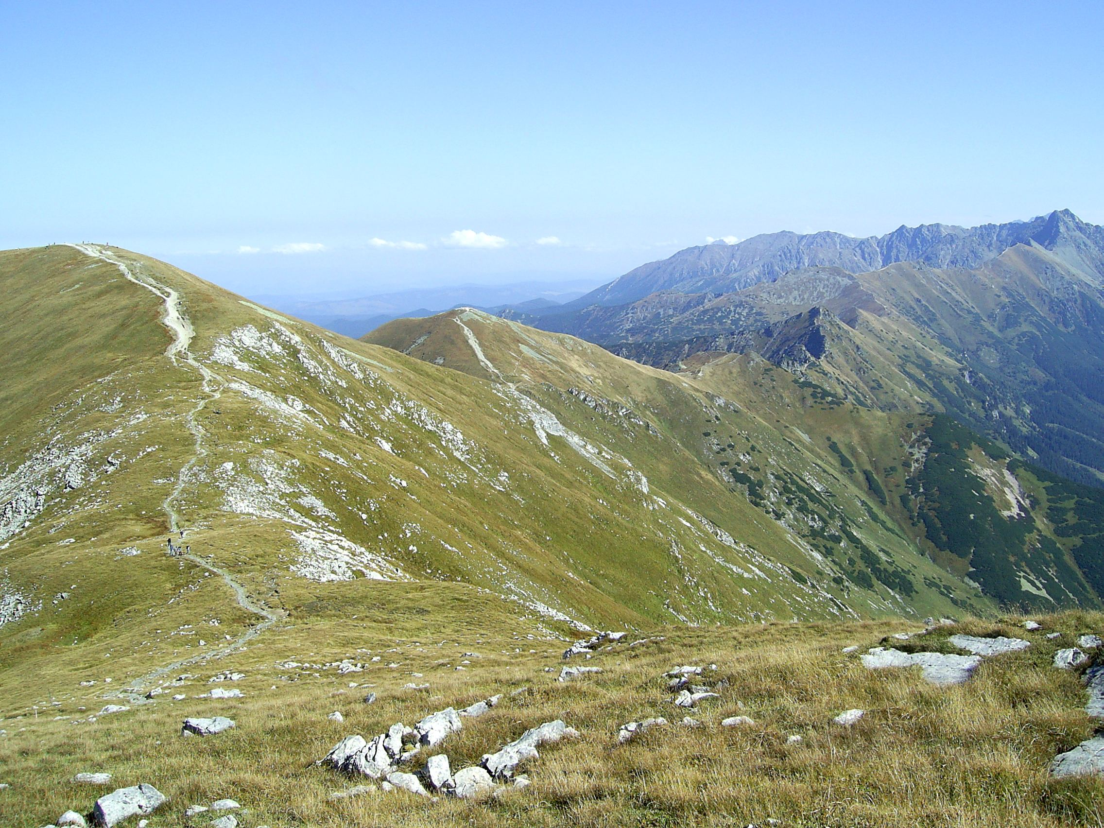 Fragment Grani Głównej Tatr od Małołączniaka do Świnicy sfotografowany ze zboczy Krzesanicy. Od lewej: Małołączniak, Małołącka Przełęcz, Kopa Kondracka, Przełęcz pod Kopą Kondracką, Suchy Wierch Kondracki, Goryczkowa Czuba, Kasprowy Wierch, Beskid, Skrajna Turnia, Pośrednia Turnia, Świnica. W tle grań boczna odchodząca od Świnicy. Zbocza opadają do Doliny Cichej Liptowskiej.